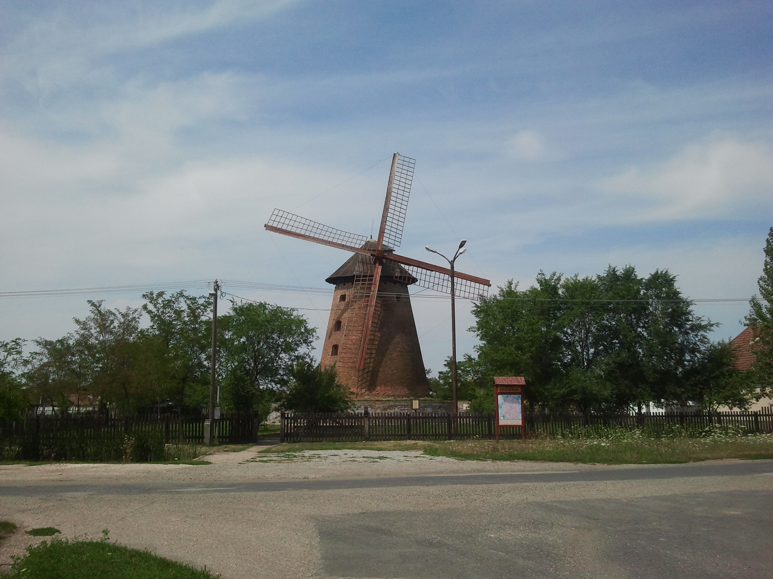 Karcagi szélmalom This is a photo of a monument in Hungary. Identifier: 6005